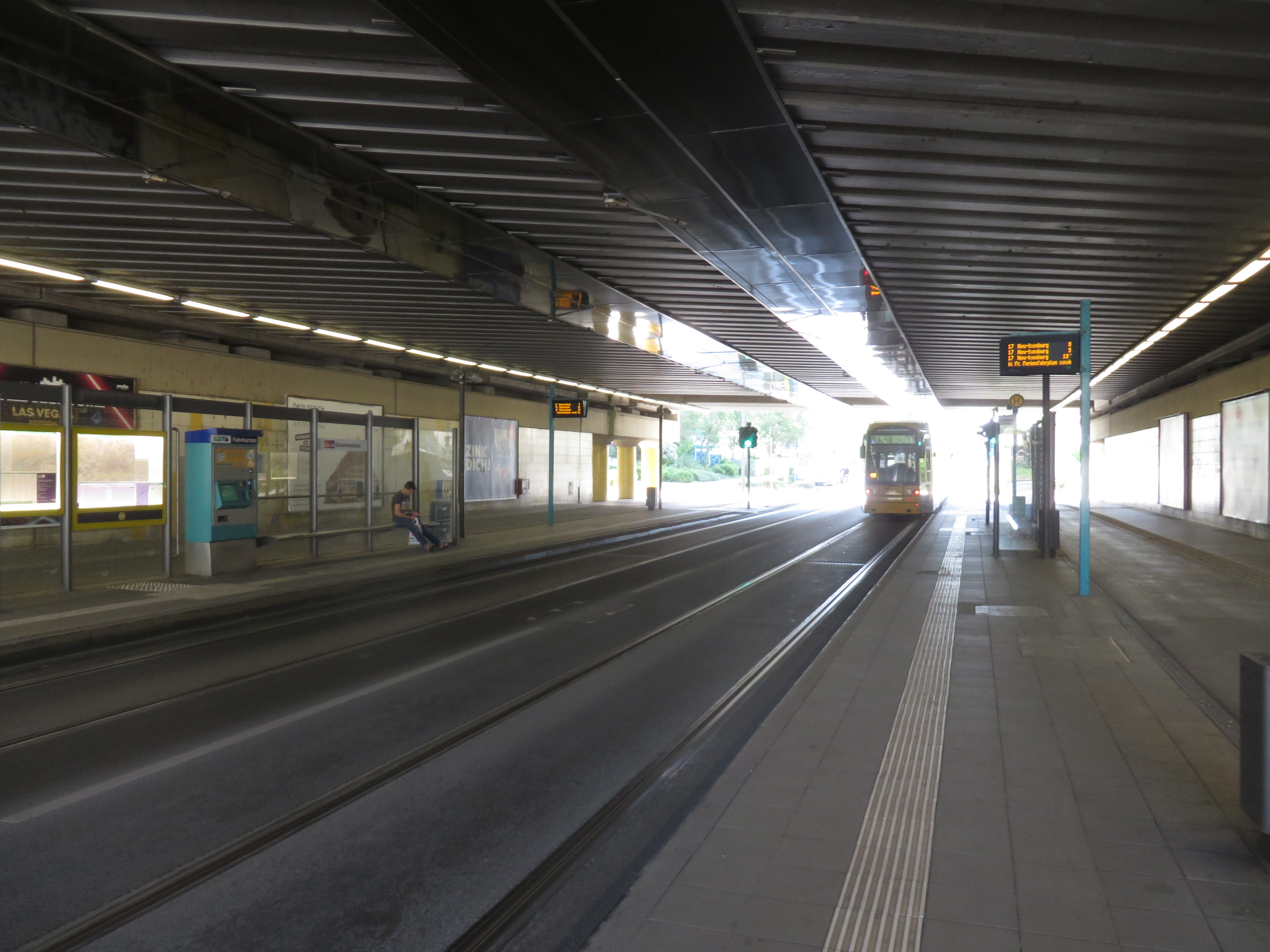 Verkehrsstation Frankfurt Stresemannallee: S-Bahn, Tram, und Bus